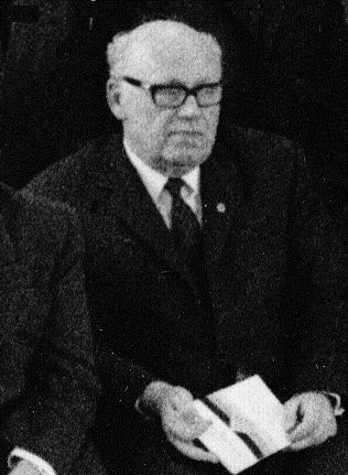 Ludwig Schneider, 1968 in Fürstenfeldbruck, Präsident des Bayerischen Schachbundes, später Präsident des Deutschen Schachbundes (1969-1975).